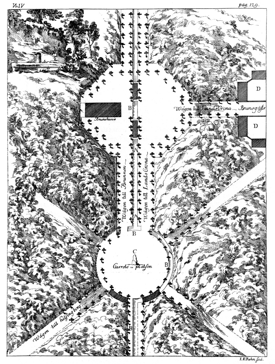 Skiss över Ramlösa brunn vid 1700-talets mitt.